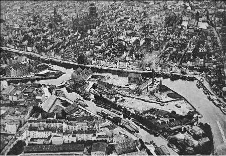 Gdańsk, wyspa Ołowianka - zdjęcie lotnicze.